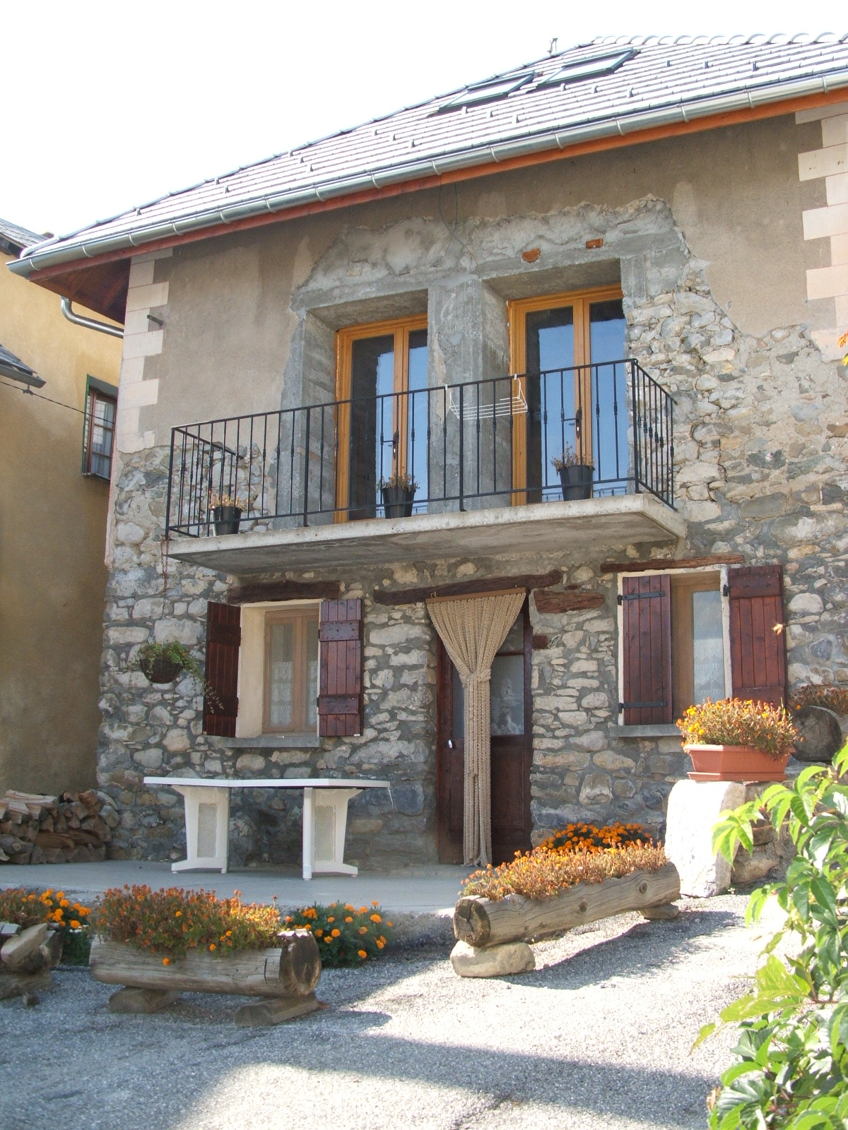 Le Sauze-du-Lac, Hautes-Alpes, France